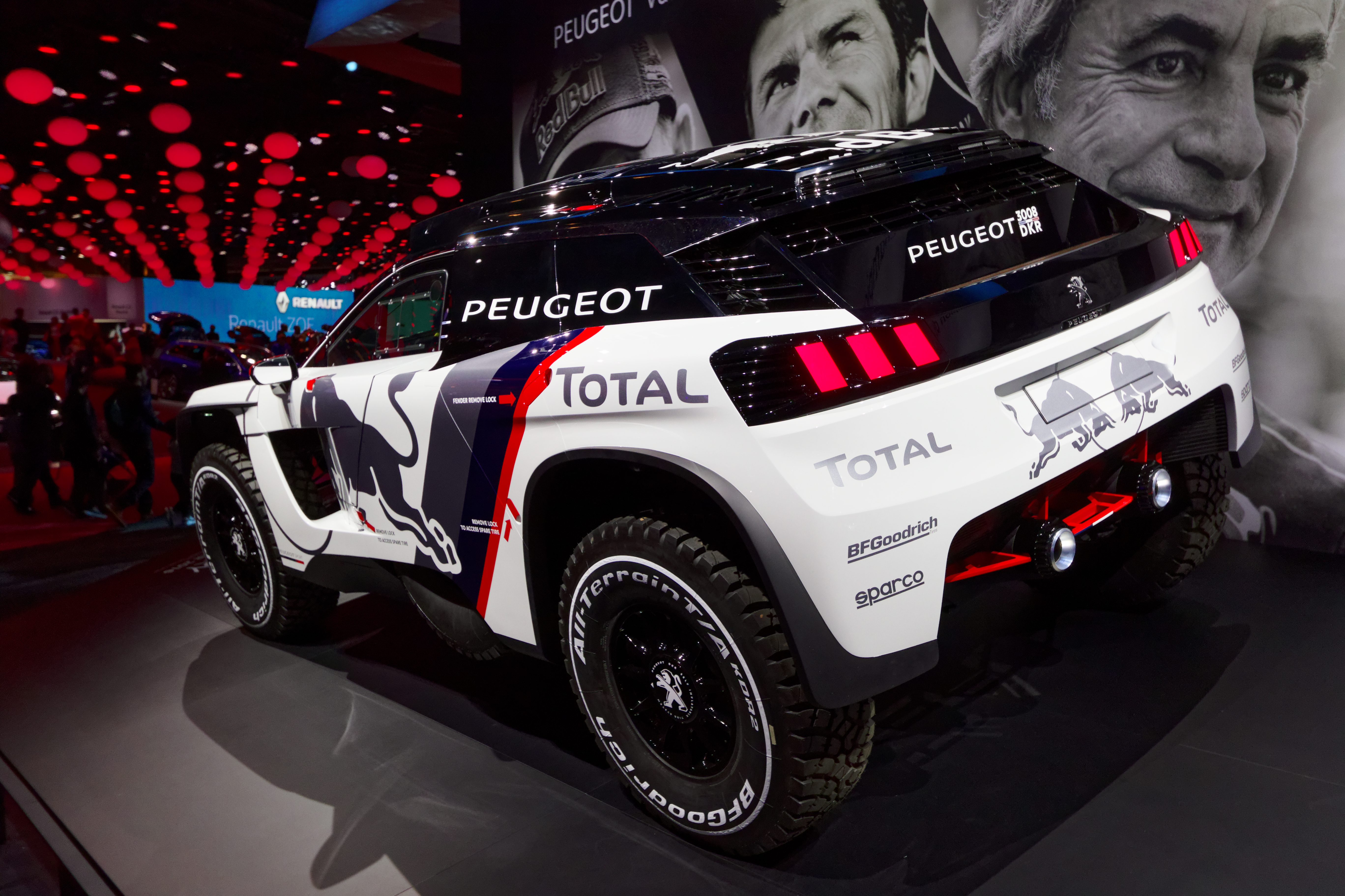 Une Peugeot 3008 DKR présentée lors du mondial de l'automobile de Paris 2016.